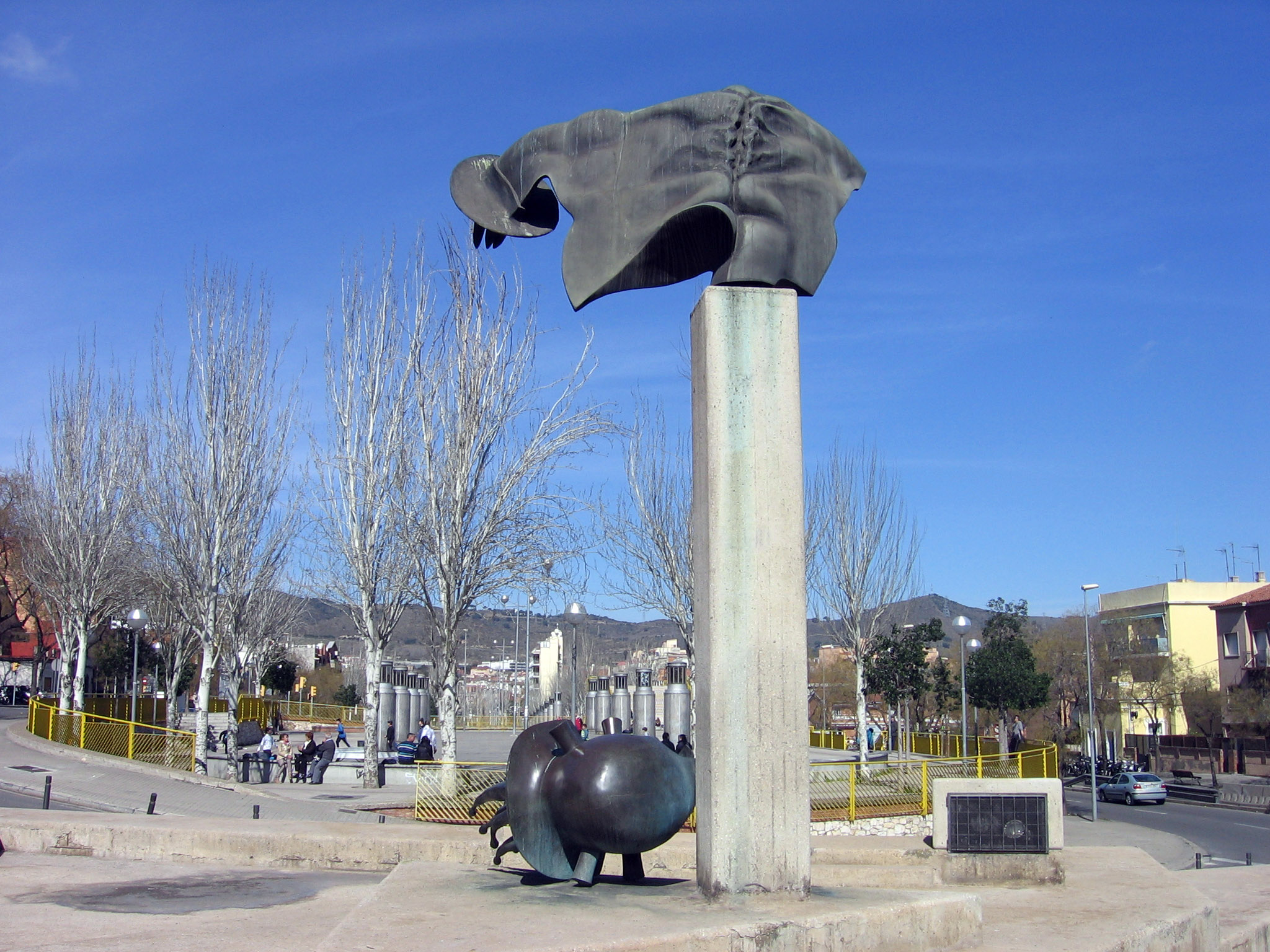 David y Goliat (Homenaje a las Brigadas Internacionales) (1988), de Roy Shifrin, Rambla del Carmelo.